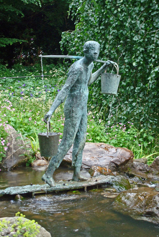 Skulptur "Der Wasserträger" an Ibrüggers Teich im Stadtpark Gütersloh